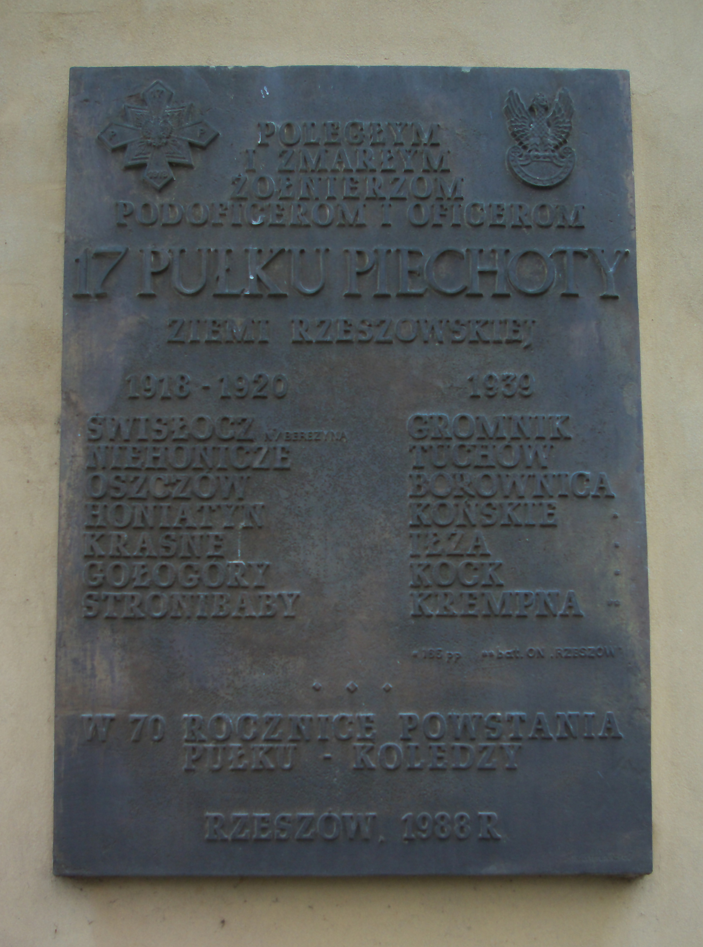 Tablica upamiętniająca 17 Pułk Piechoty na fasadzie kościoła św. Wojciecha i św. Stanisława w Rzeszowie